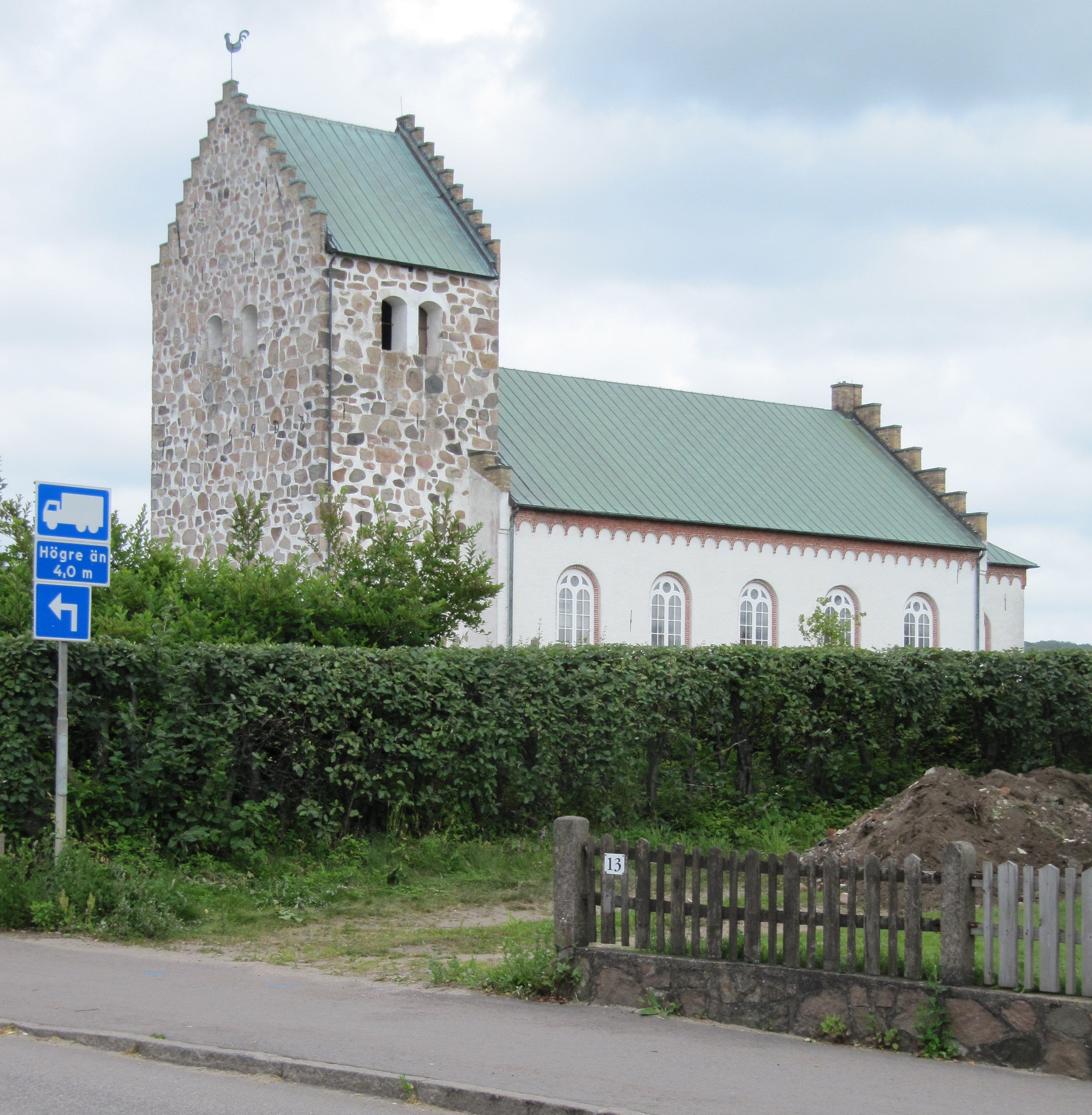 Förslövs kyrka